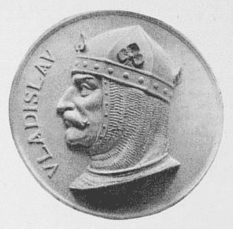 Návrh medailonu pro schodiště muzea zobrazující knížete Vladislava